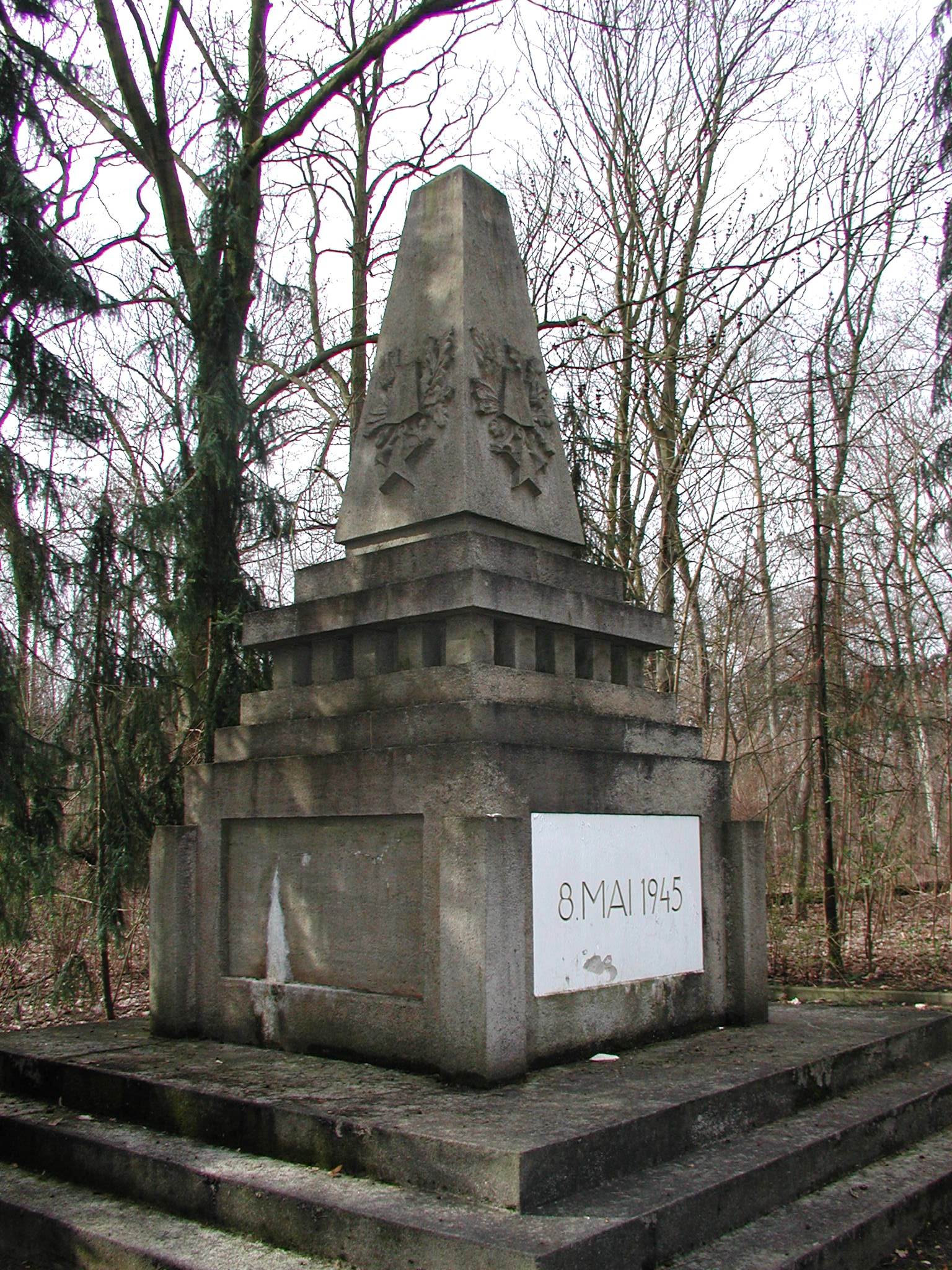 Herzbergstraße, Befreiungsdenkmal im KEH